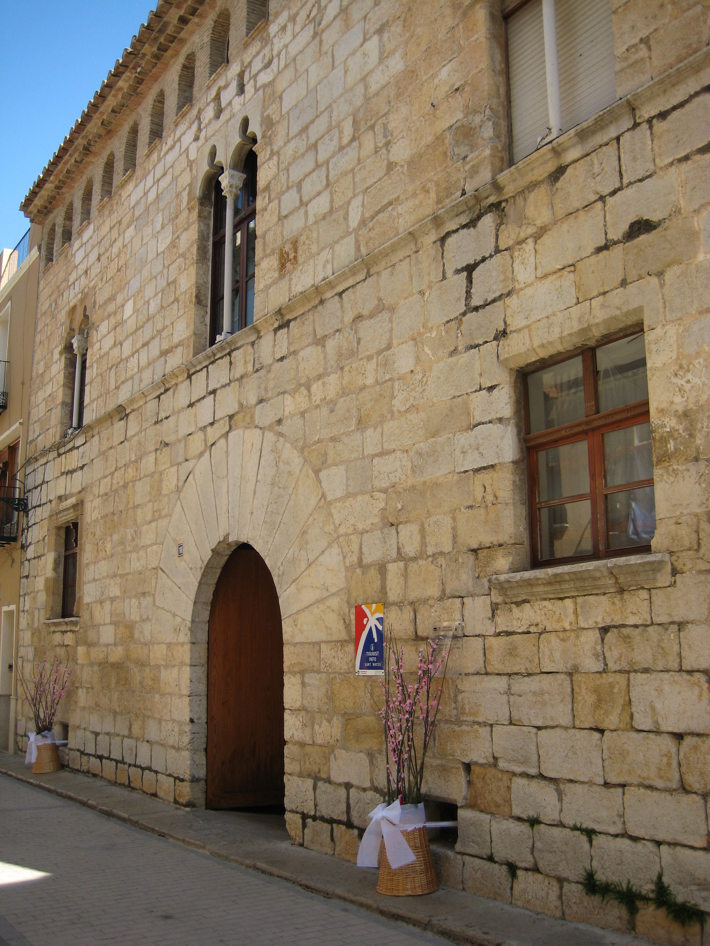 Palau Borrull de Sant Mateu (Baix Maestrat)